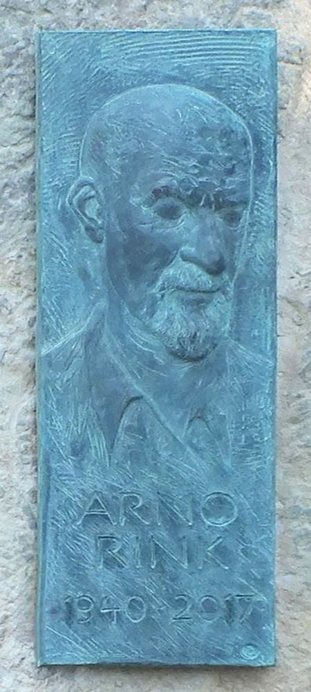 Reliefplatte am Grabstein von Arno Rink, gestaltet von Markus Gläser nach einem Selbstbildnis Rinks